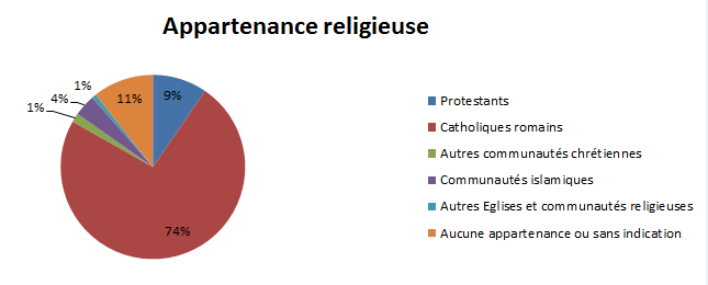 Religions pratiquées à Marly dans le canton de Fribourg en Suisse (recensement de l'an 2000)